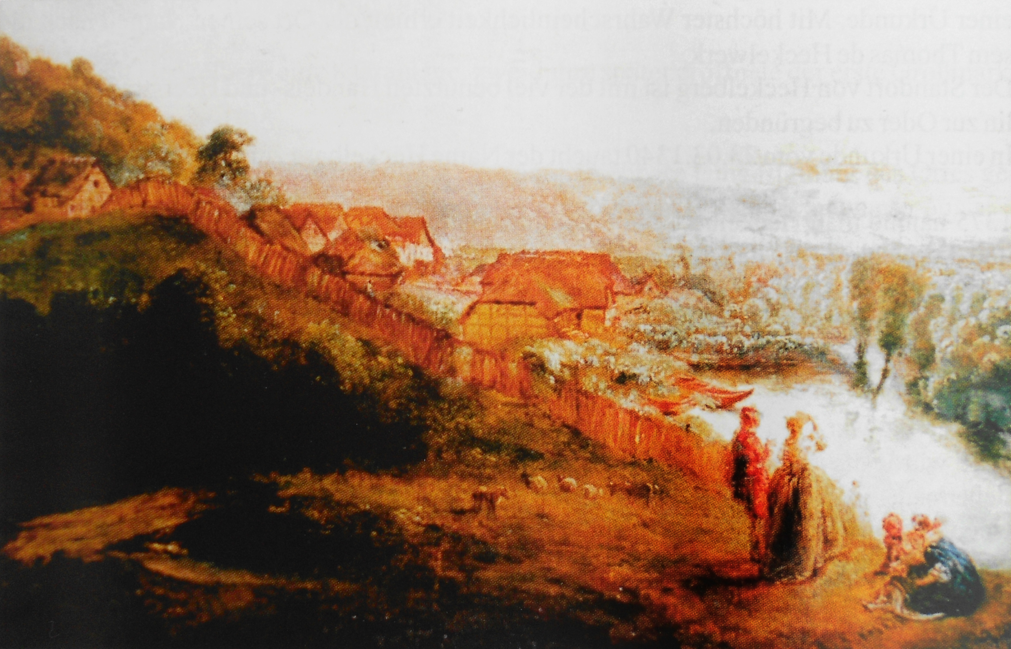 Kiez in Freienwalde von Antoine Pesne, * 23. Mai 1683, † 5. August 1757 Offenbar ist dies ein idealisiertes Bild, weder Oder noch Alte Oder sind am Fuße der Erhöhung des Urstromtals entlanggeflossen, solange Menschen in Freienwalde siedeln. Dargestellt sind wahrscheinlich die ersten Wohnbauten in der Nähe des Gesundbrunnens sowie die Oder. Deren Flußverlauf wurde ab 1747 durch Eindeichung und Schaffung des Oderbruchs verändert.